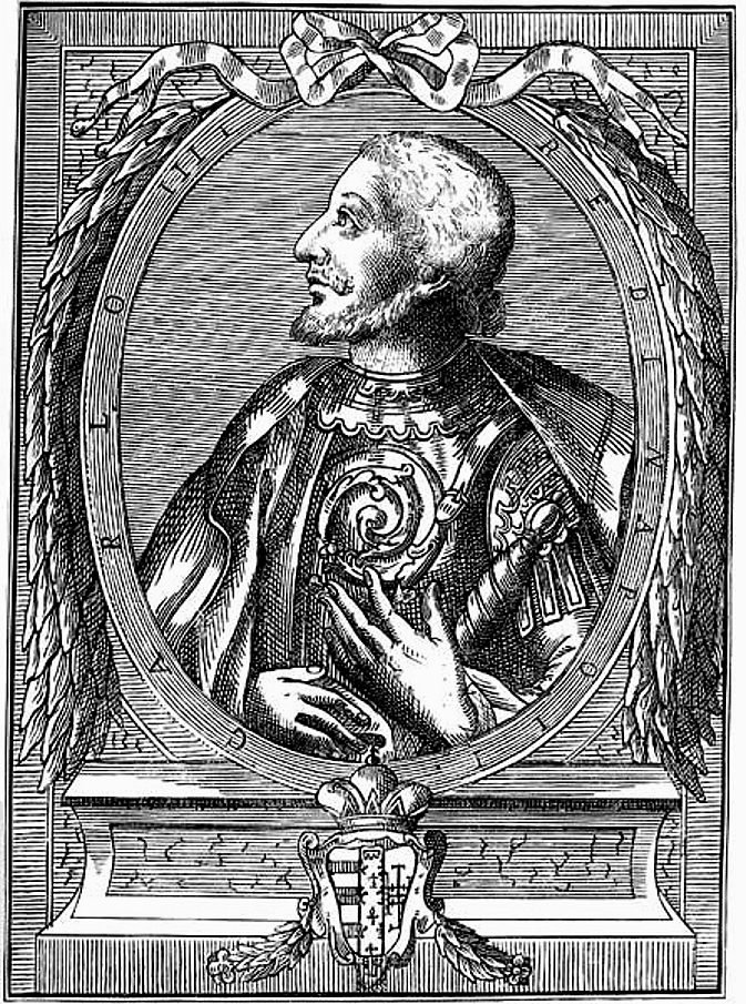 II. Károly (Summonte rézmetszetéről)